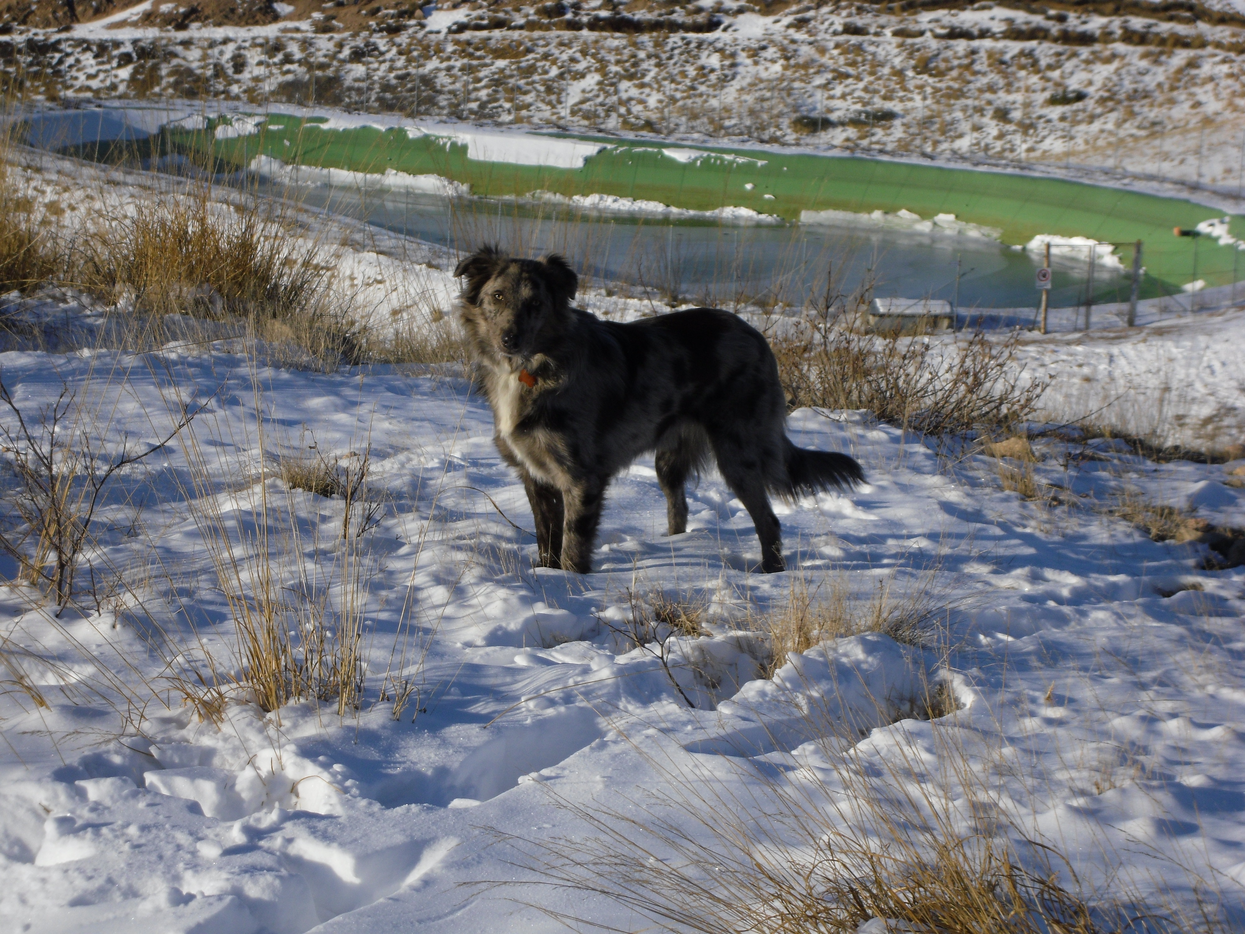 tipico esemplare di pastore biellese di 1 anno con manto blue merle